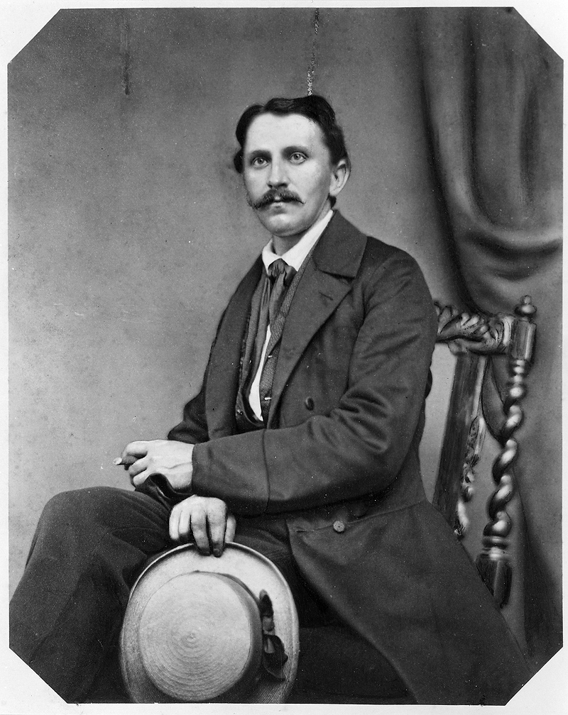 August Kotzsch, Selbstbildnis 1860